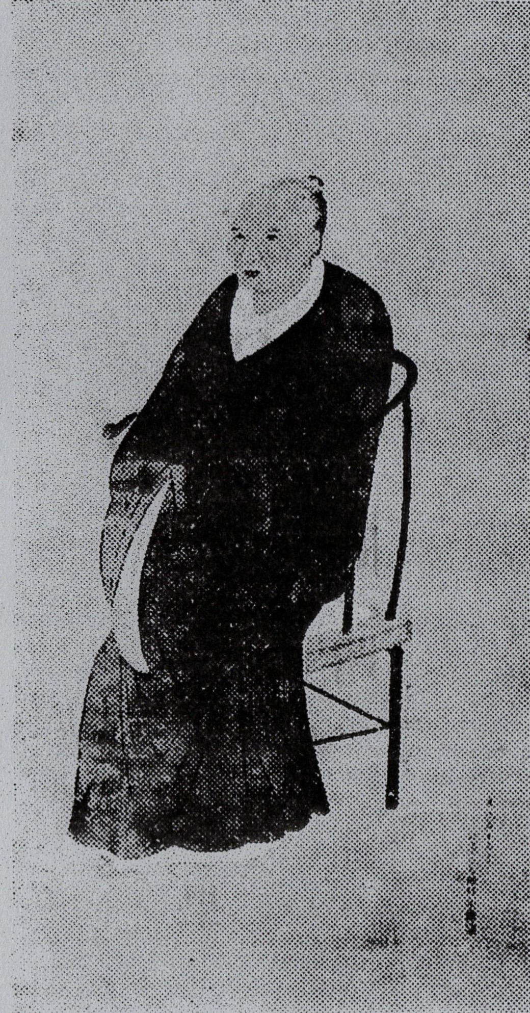 関長治の肖像。